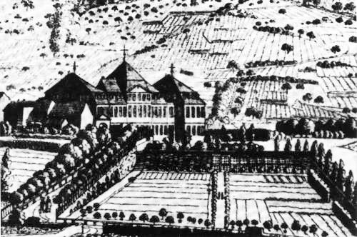 Bad Dürkheim, Leininger Schloss (nicht mehr existent), am Platz des heutigen Kurhauses